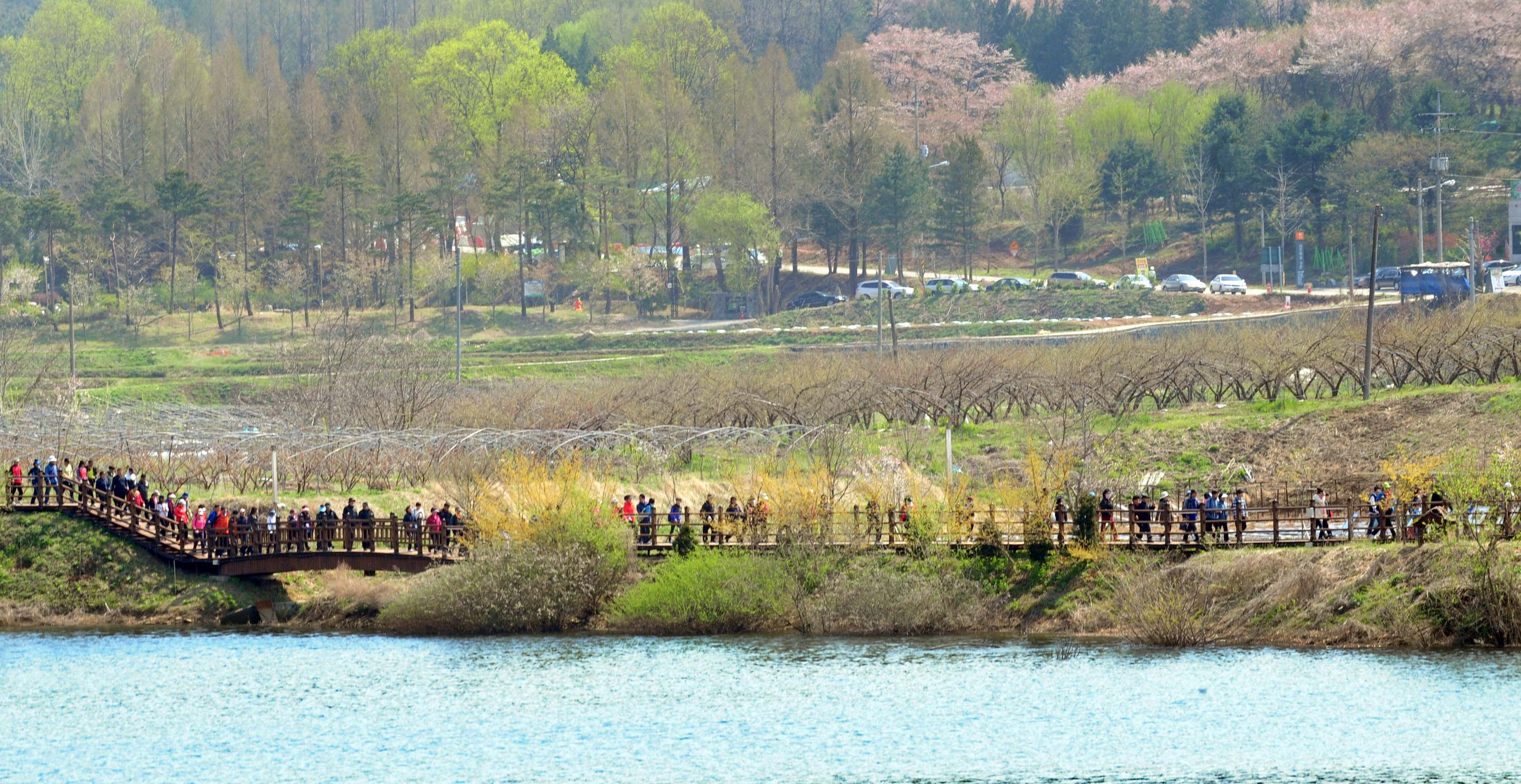 대청호오백리길 21구간